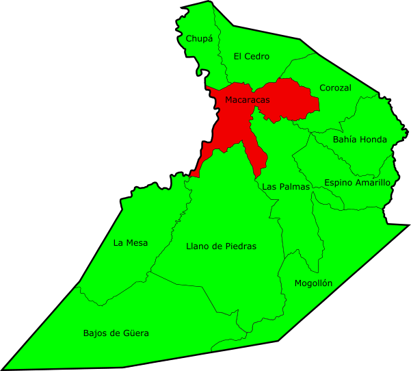 Corregimientos de Macaracas